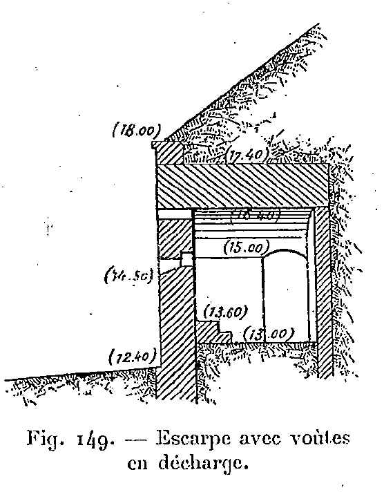 Legrand-Girarde et Plessix. Manuel complet de fortification. 4e édition. Paris (1909).